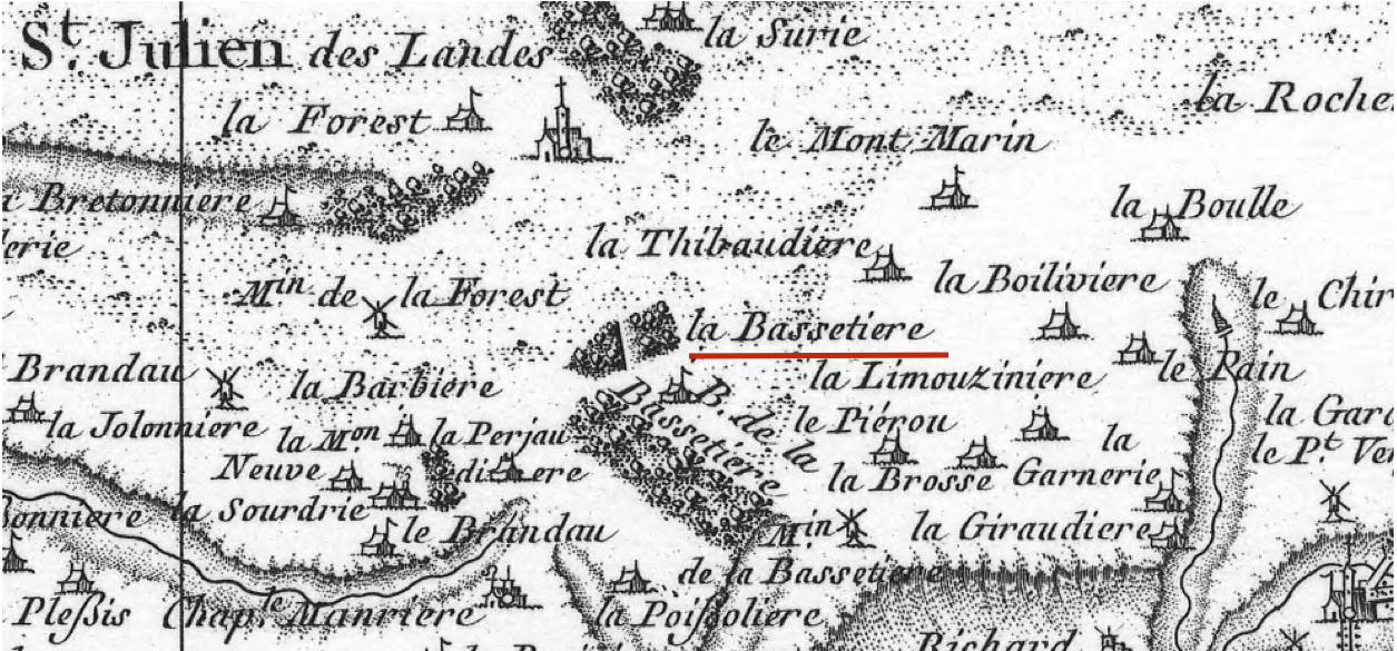 Sur cette carte de Cassini datant du XVIIIème siècle, on voit mentionné le château et le bois de la Bassetière